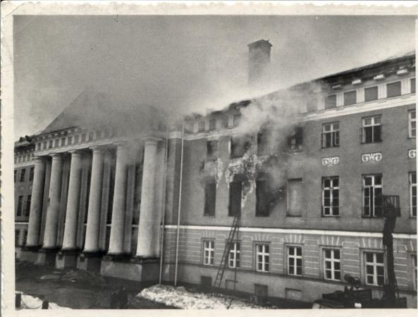 PF0018-001 TÜ EMSA. TÜ peahoone põleng 1965. aasta detsembris